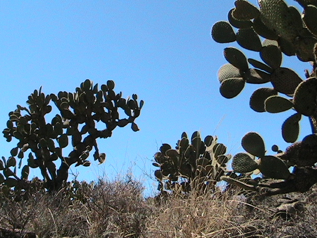 Esta foto fue tomada en las afueras del pueblo de Ojitos de Santa Lucia, Zacatecas, Mexico en el Cerro de la Peña. Muestra a unos nopales, un ejemplo del medio ambiente en tal lugar.